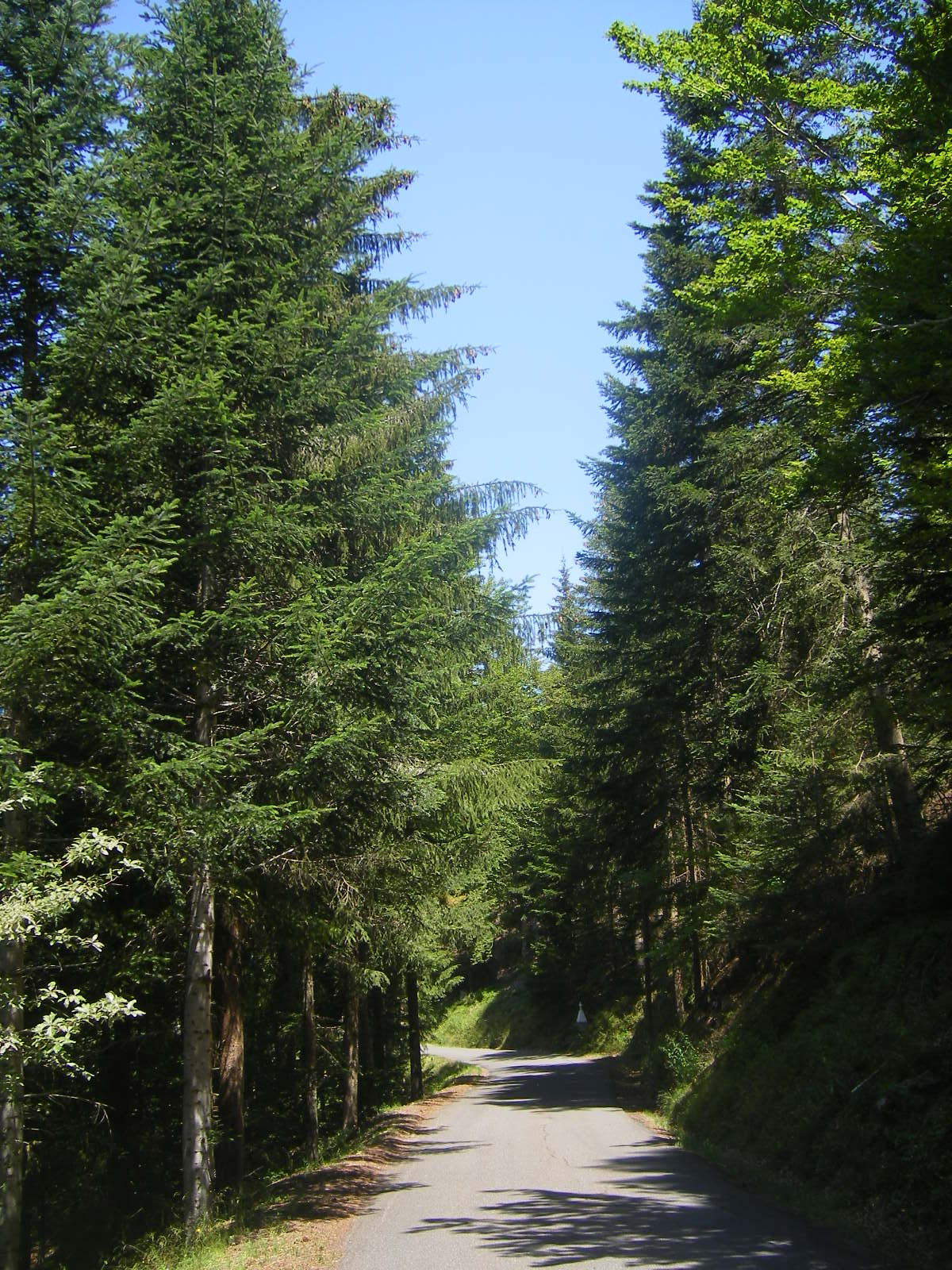 Foret de Mercoire (near Cheylard l´Éveque, Lozere)